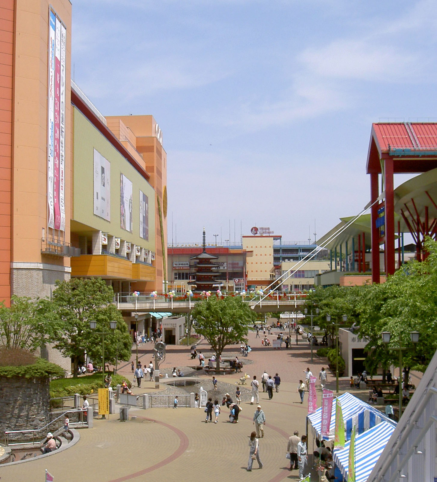 ViNA WALK, the shopping mall in Ebina, Kanagawa, Japan ja: ビナウォーク